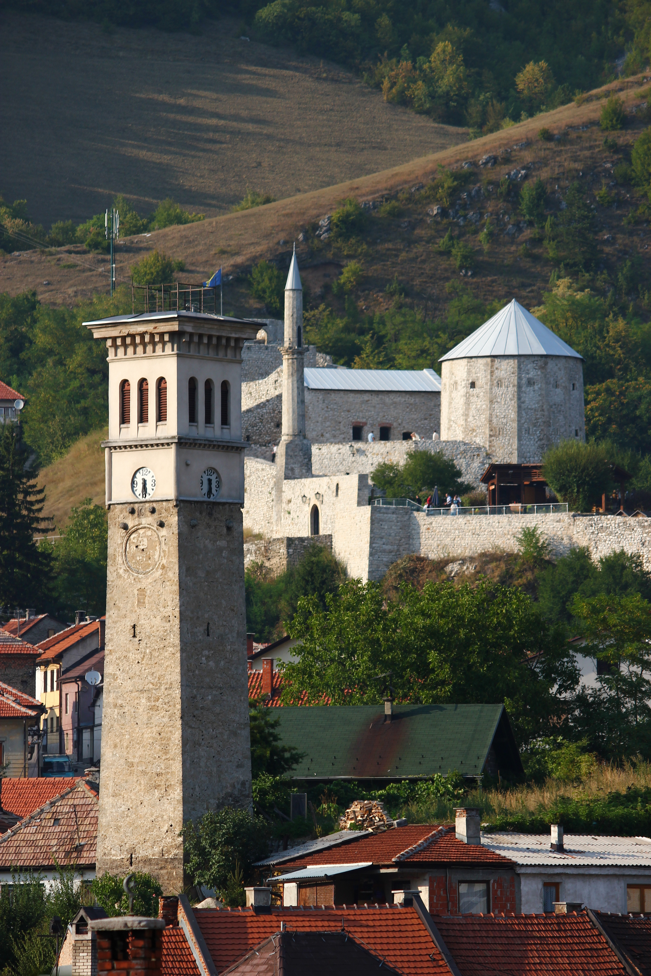 Travnik, der Uhrturm in der Altstadt und die Festung im Hintergrund.